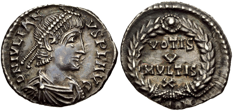 Siliqua di Giuliano imperatore (361-363) 17 mm, 1.81 g, zecca di Arles